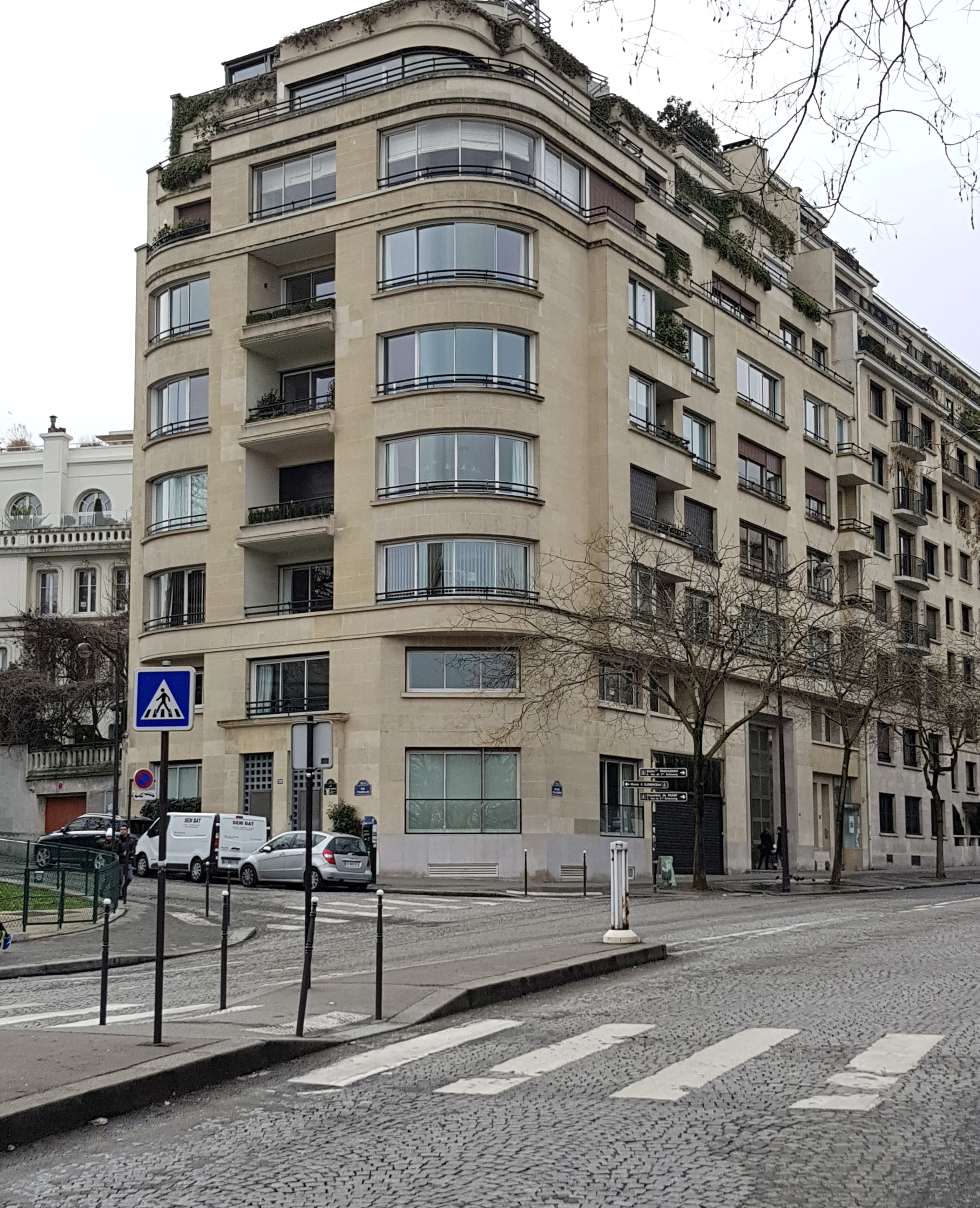 Immeuble du n° 1 de l'avenue Paul-Doumer, Paris XVIe.